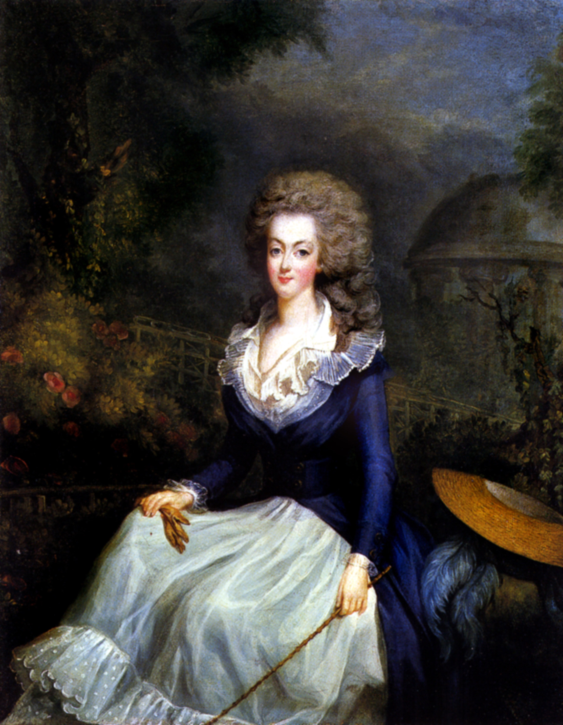 Queen Marie Antoinette of France, 1778label QS:Len,"Queen Marie Antoinette of France, 1778"label QS:Lit,"Maria Antonietta indossa un vestito da amazzone e sullo sfondo appare il Tempio dell'Amore costruito nei giardini di Versailles."